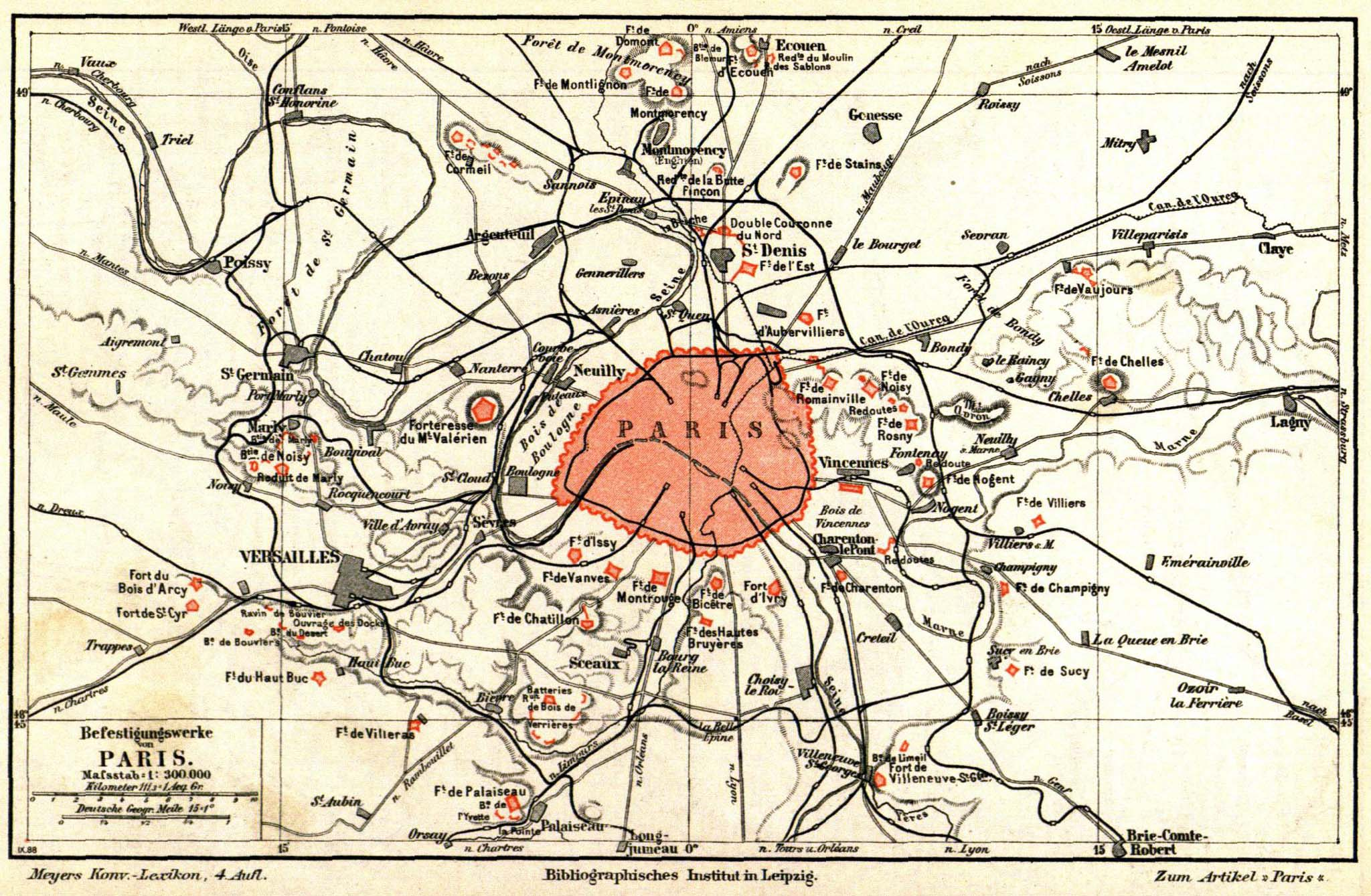 Karte „Befestigungswerke von Paris“ (1 : 300 000)